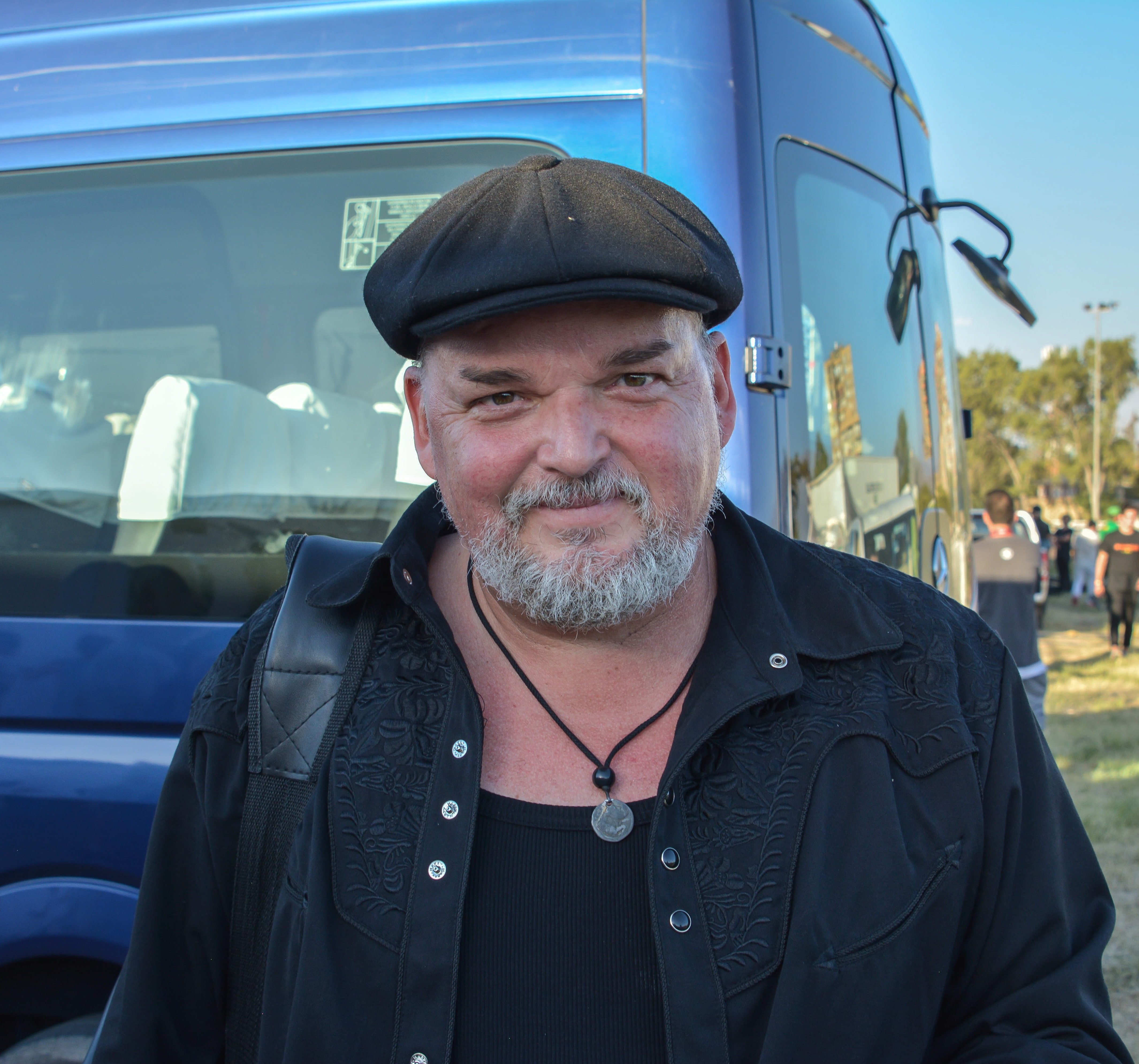 Alain Johannes en la Cumbre del Rock Chileno 2018, Santiago, Chile